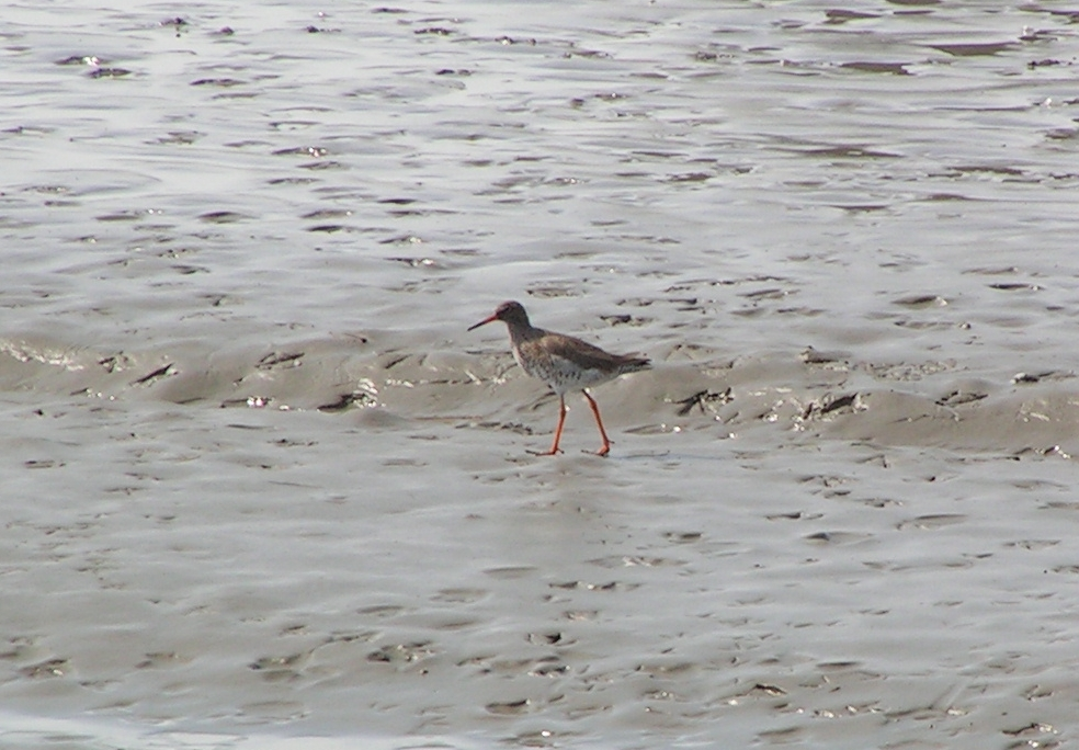 TRinga totanus in german nationalpark Schleswig-Holsteinisches Wattenmeer .